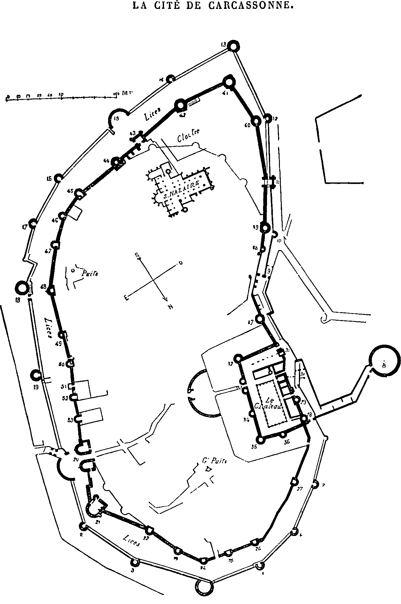 Dessin extrait de l'ouvrage La cité de Carcassonne par Eugène Viollet-le-Duc. Le dessin est intitulé : Figure N°16, Plan général de la cité. Notice Gallica : Type : texte imprimé, monographie Auteur(s) : Viollet-le-Duc, Eugène-Emmanuel (1814-1879). Auteur du texte Titre(s) : La cité de Carcassonne (Aude) [Texte imprimé] / par Viollet Le Duc Publication : Paris : Librairie des imprimeries réunies, 1888 Description matérielle : 85 p. : ill. ; in-8 Sujet(s) : Carcassonne (Aude) -- Cité -- Histoire Notice n° : FRBNF36570974